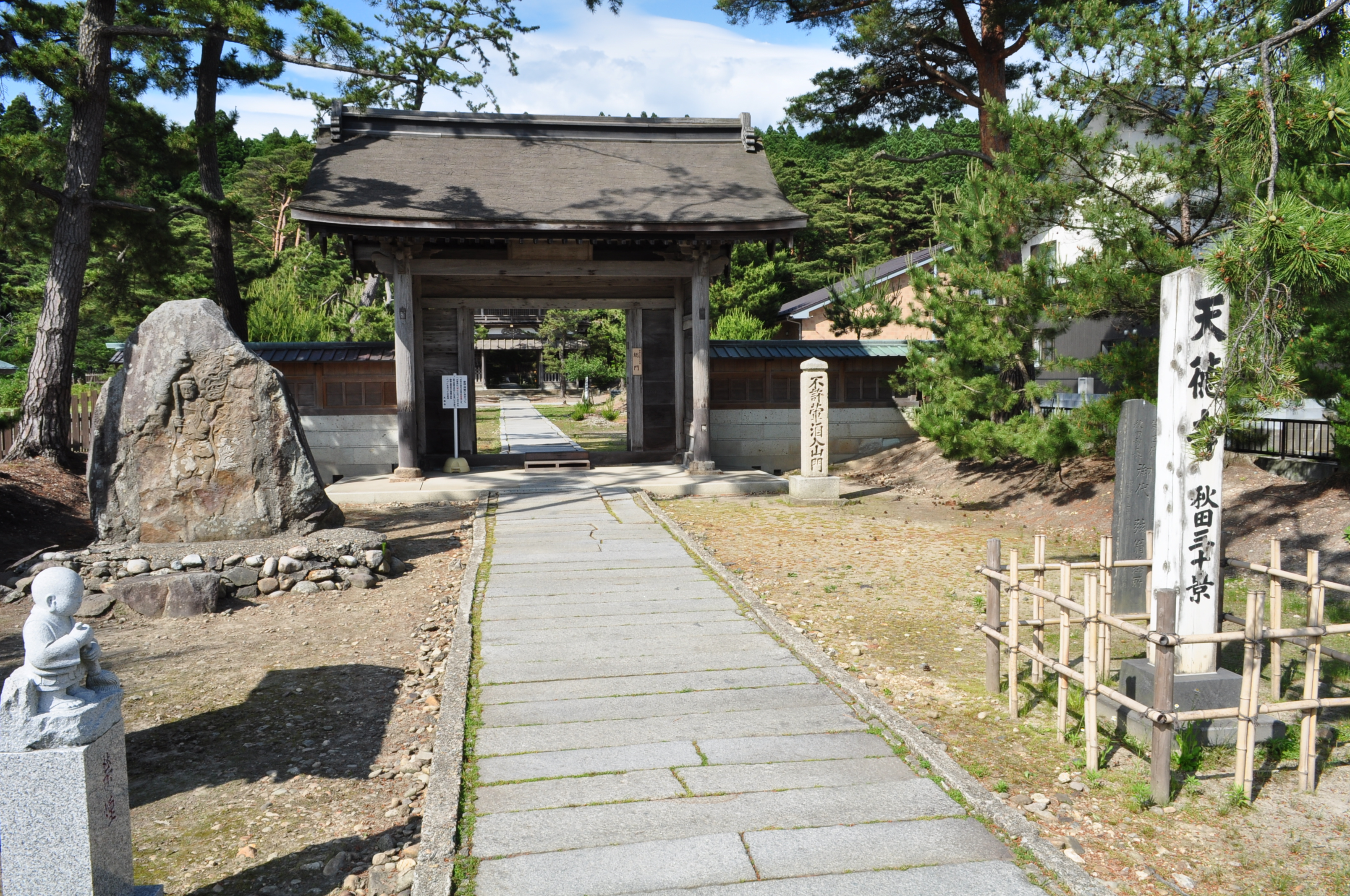 樋口家の菩提寺である天徳寺の総門